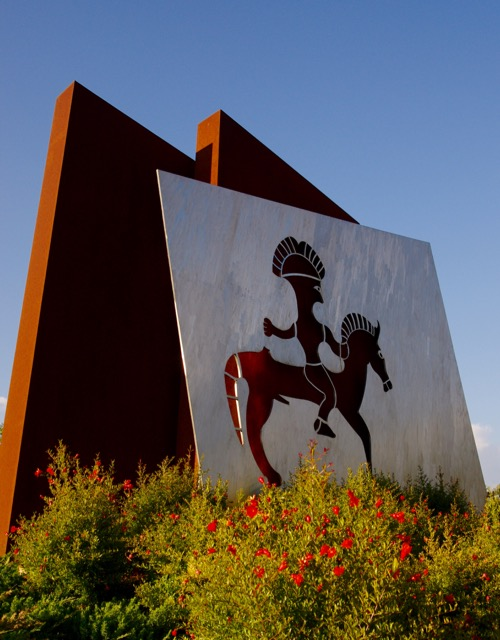 Museo retico This is a photo of a monument which is part of cultural heritage of Italy.